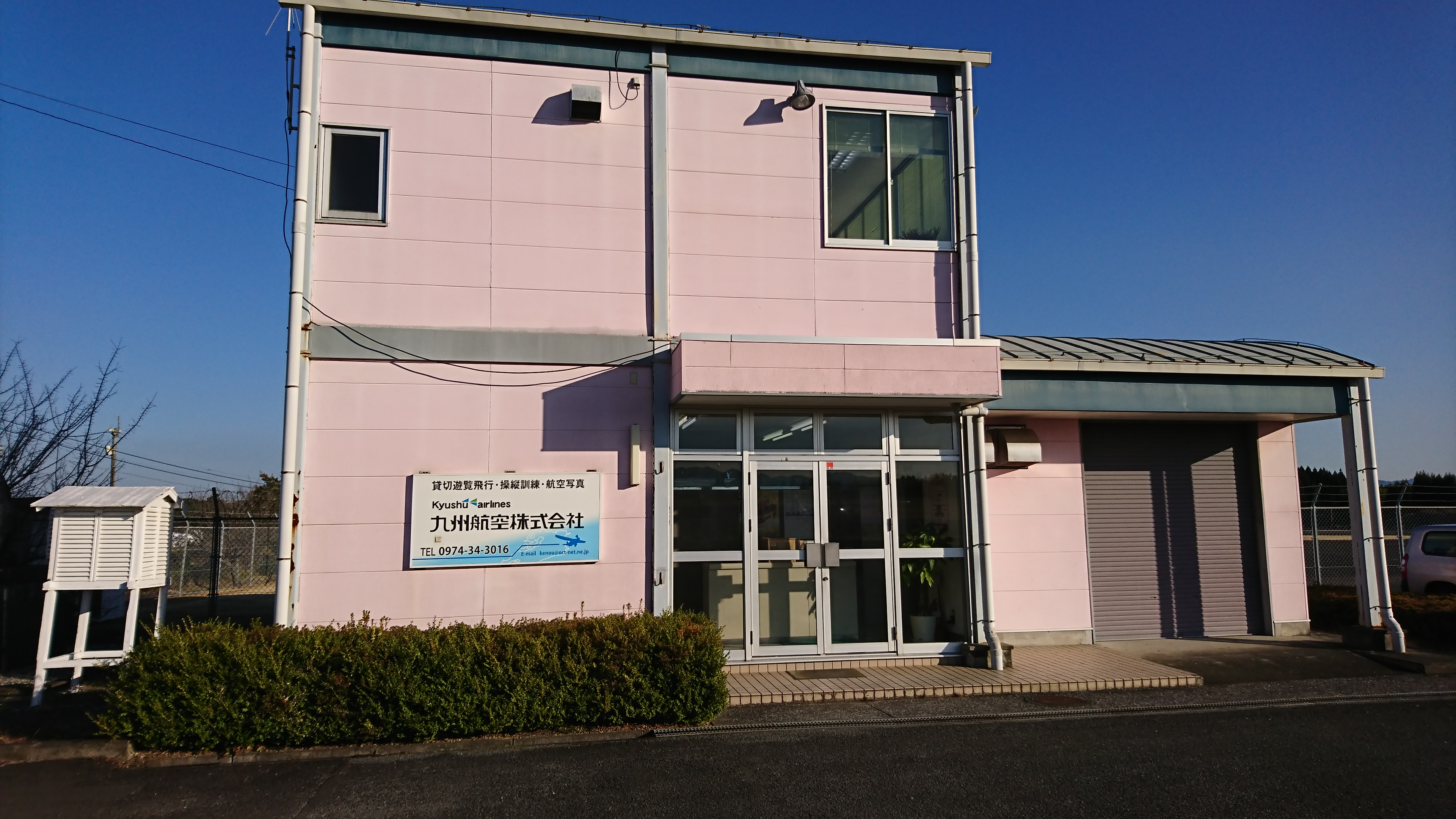 九州航空大分県央運航所